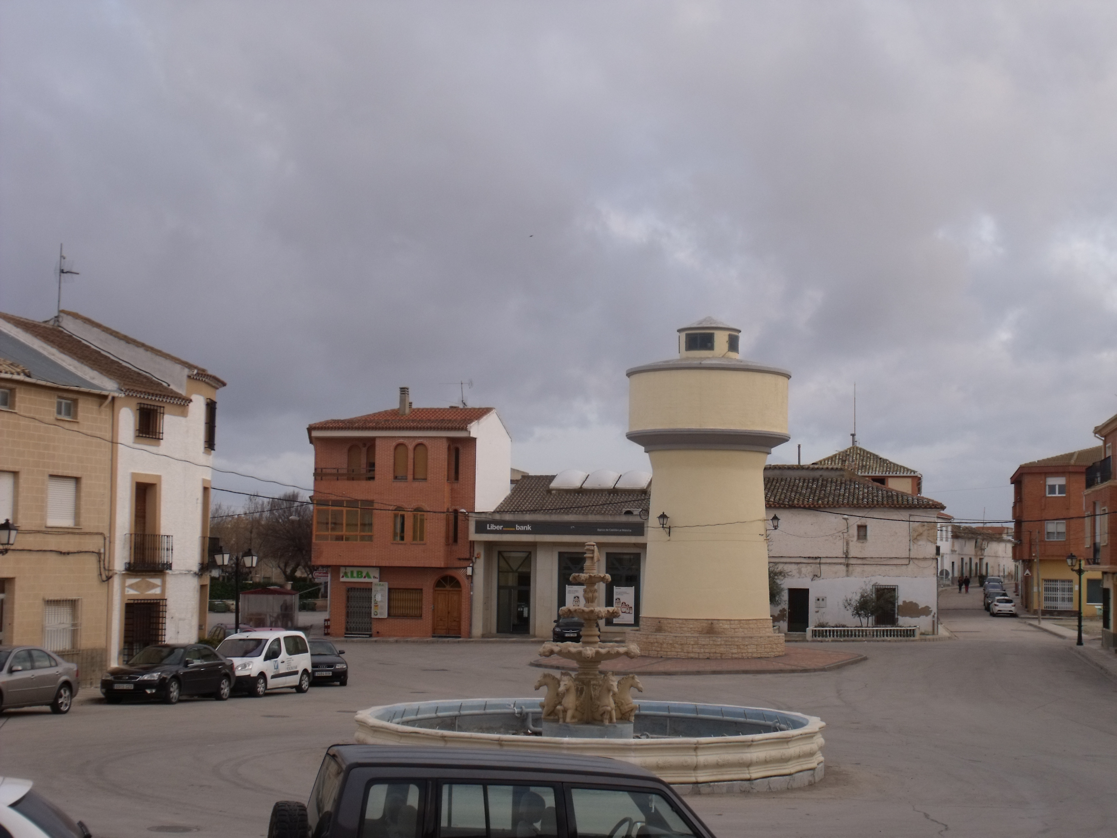 Depósito de agua